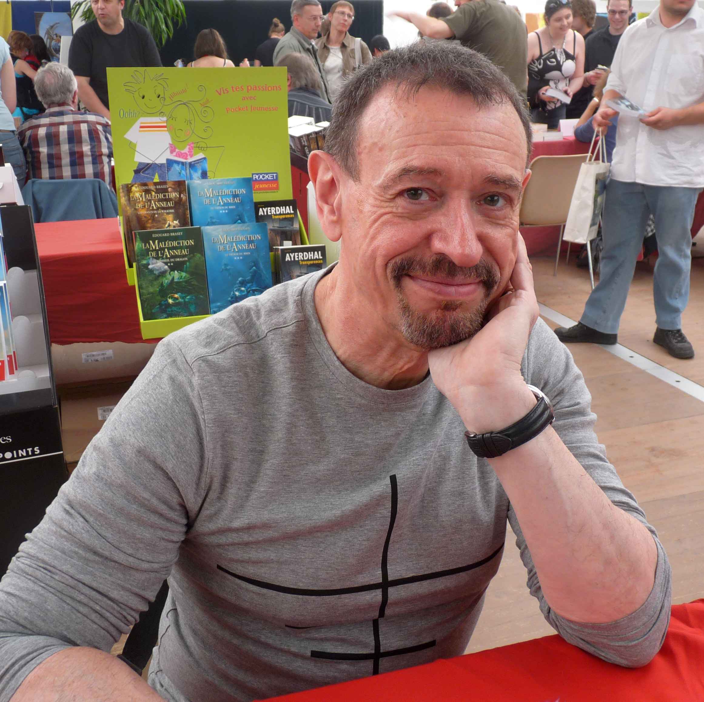 L'écrivain de science-fiction Francis Berthelot (Imaginales 2010, Epinal)